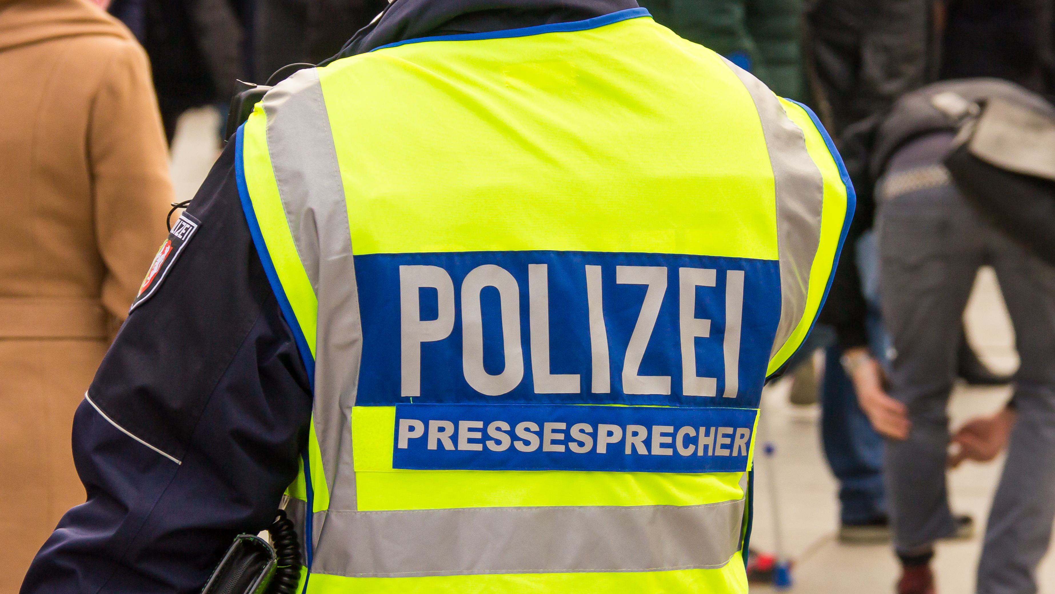 Flashmob gegen Männergewalt auf der Treppe vom Bahnhofsvorplatz Köln hoch zum Kölner Dom in Reaktion auf die sexuellen Übergriffen in der Silvesternacht 2015/2016 Foto: Pressesprecher der Polizei